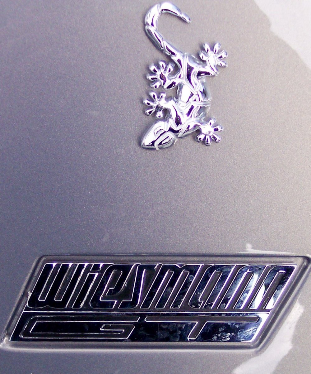 Wiesmann-Logo auf einem GT